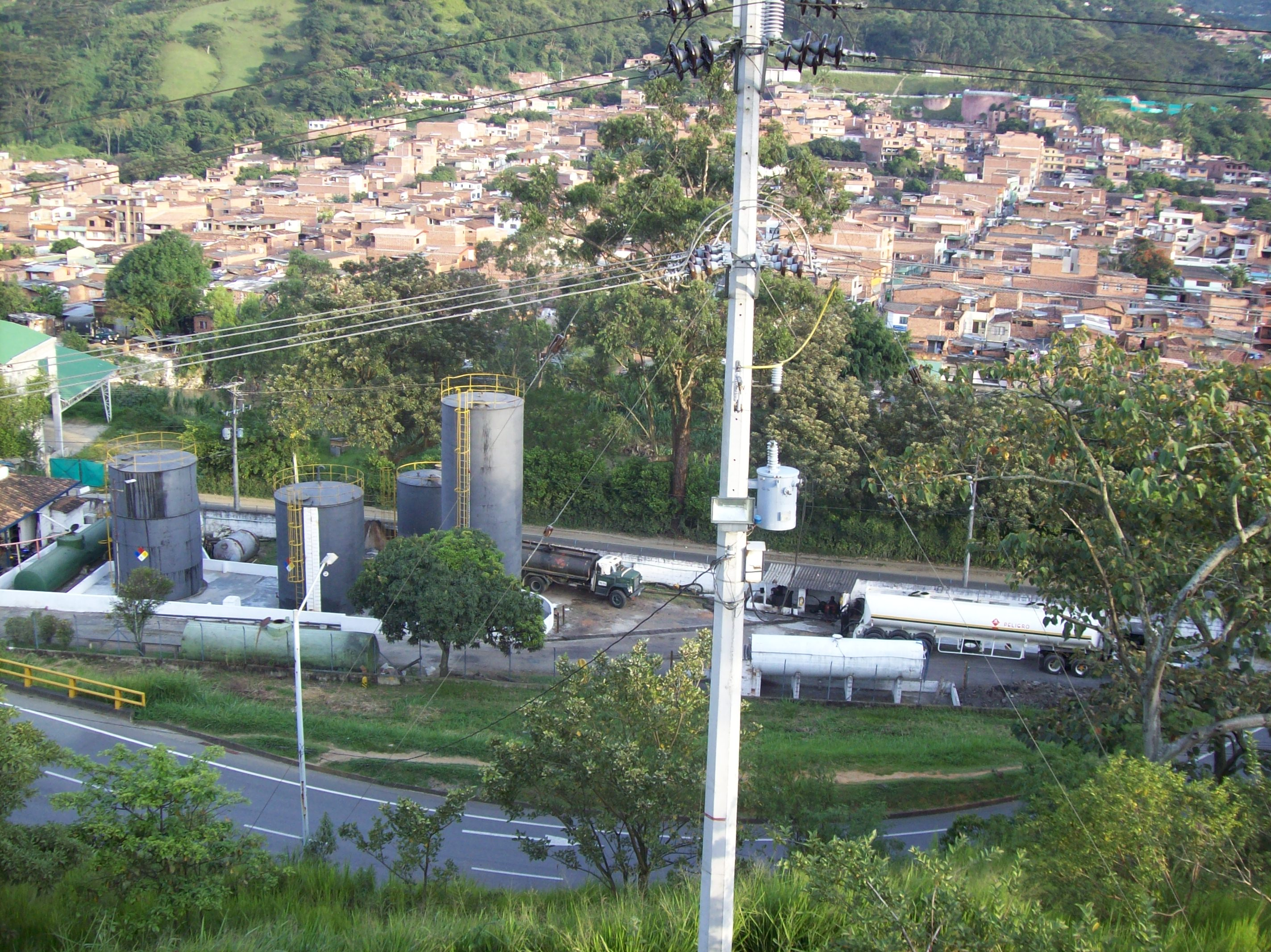 Panorámica de Copacabana.